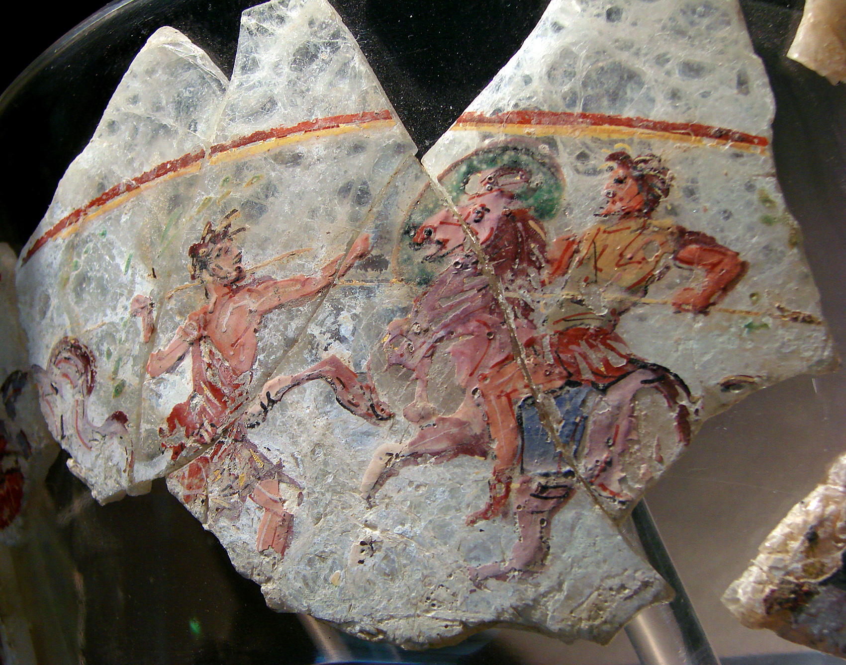 Scène de combat, verre émaillé, 1er siècle après JC, trésor de Begram, région de Kapiça, Afghanistan. Musée Guimet, Paris.